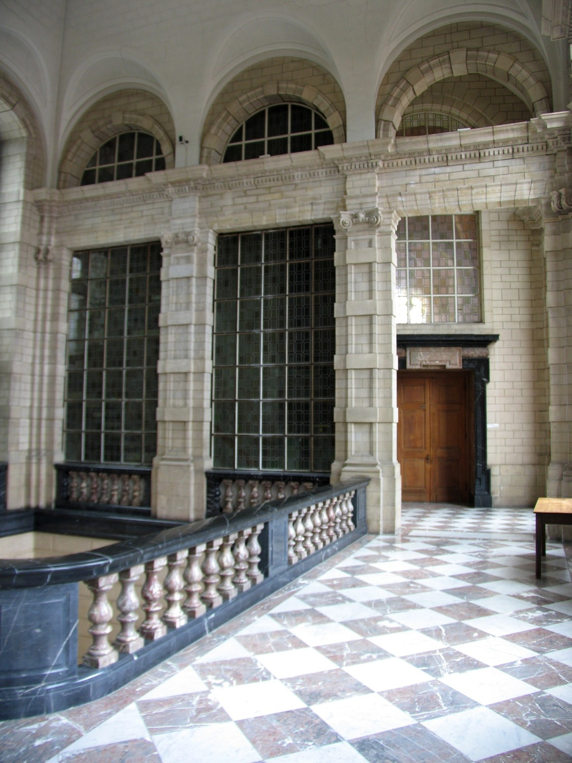 Leuven Naamsestraat 22, Oude Markt 13, Krakenstraat 2 Regavleugel trappenhuis